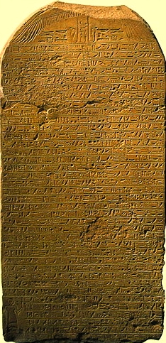 Seconde stèle de Kamosis, commémorant sa campagne victorieuse contre les Hyksôs, musée de Louxor.